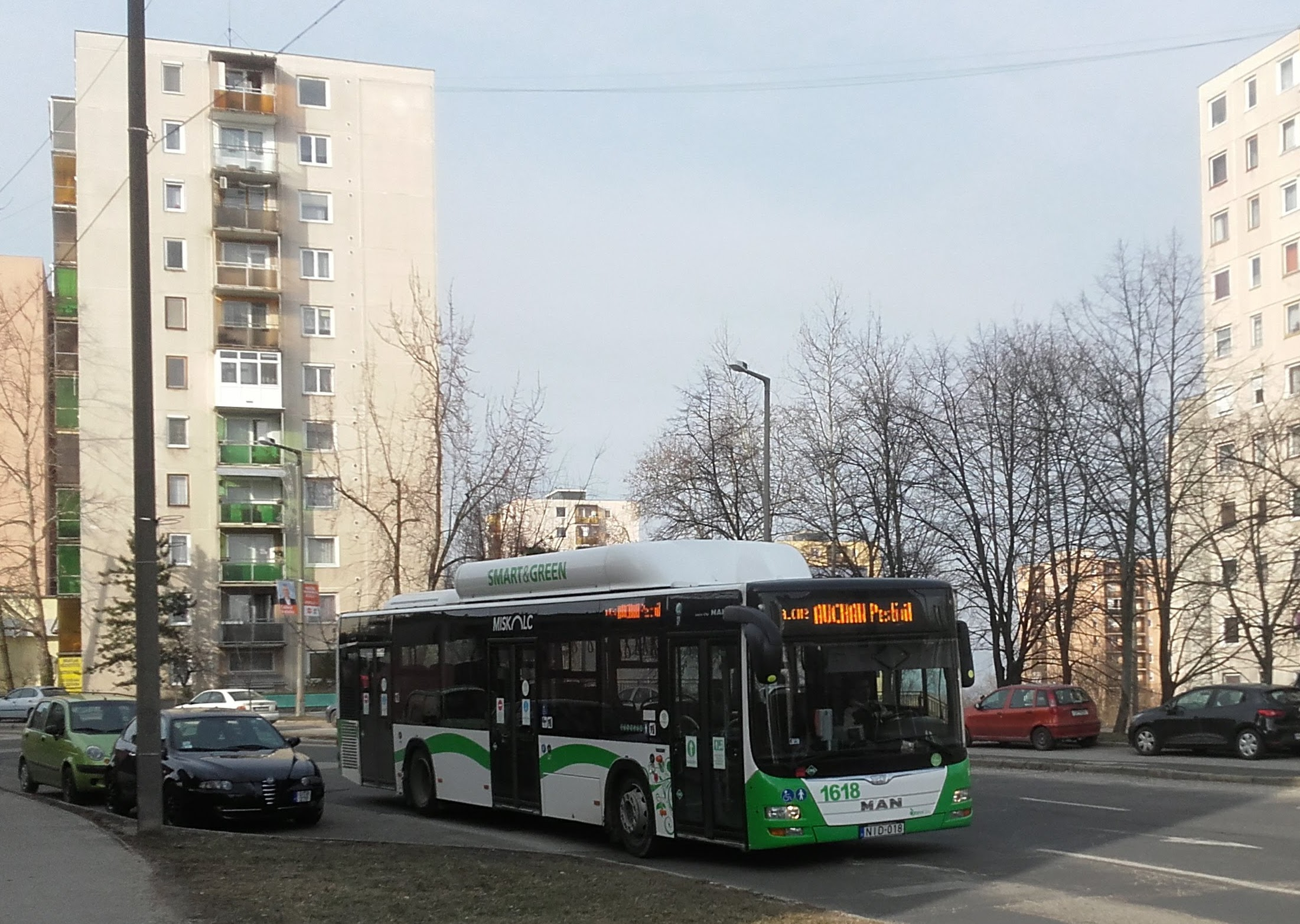 Az MVK NID-018 rendszámú, MAN Lion's City CNG típusú Auchan 2-es járata az Avason.